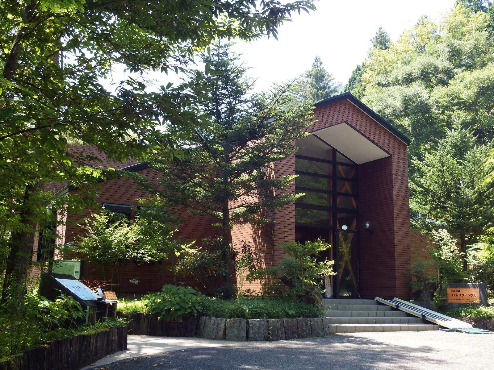 住友の森 フォレスターハウス